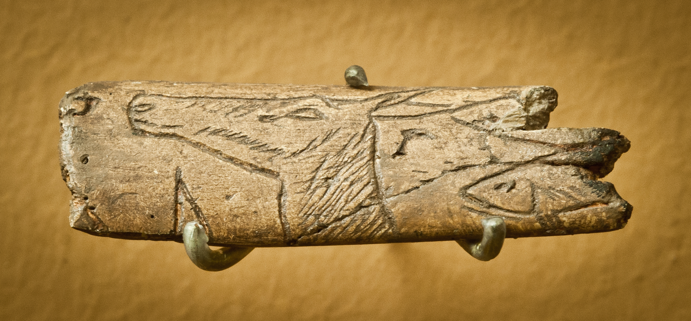 Os gravé provenant de la grotte de la Vache (Ariège). Conservé au Musée d'Archéologie Nationale à Saint-Germain-en-Laye (Yvelines, France).